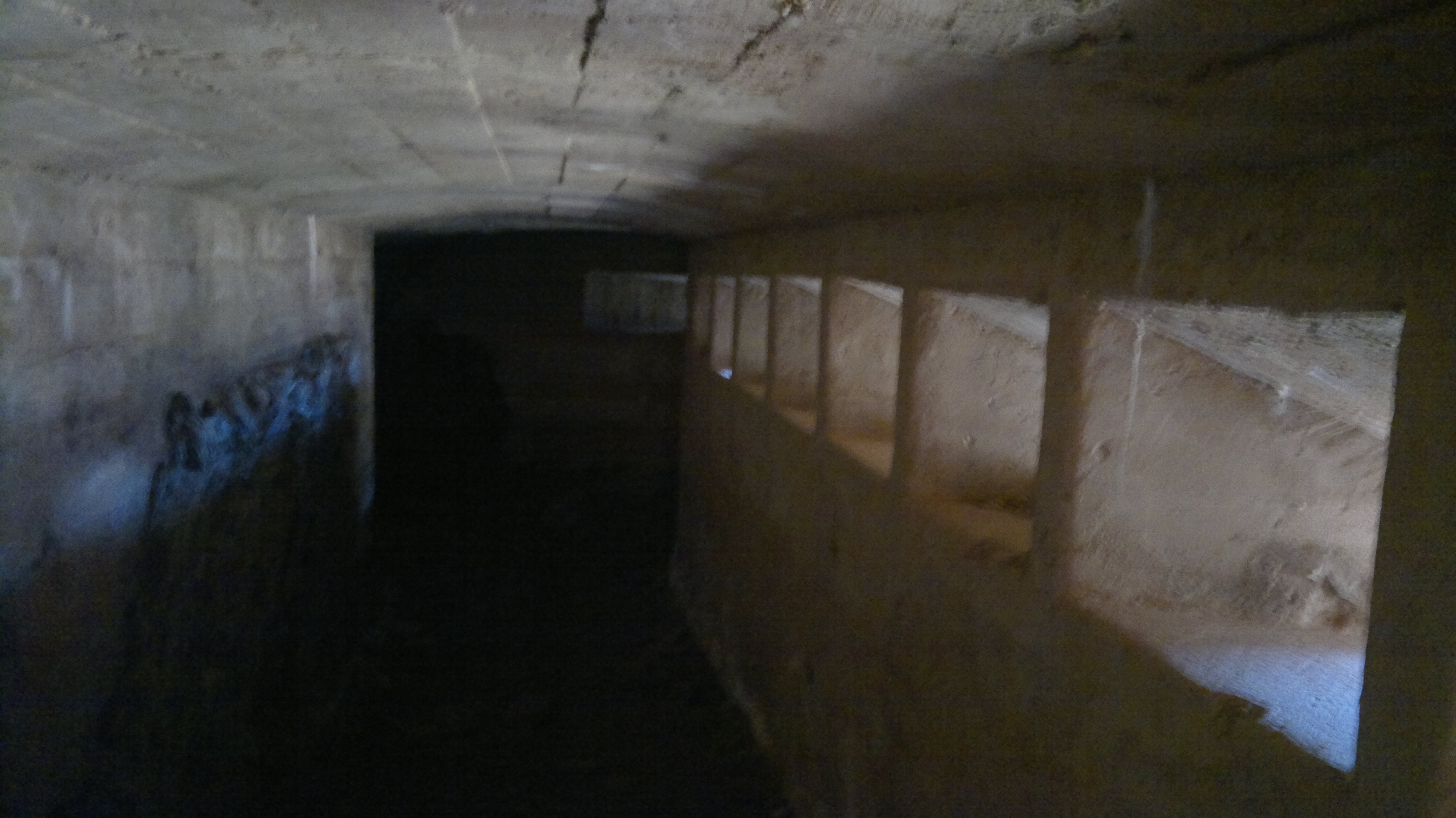 Pasillo